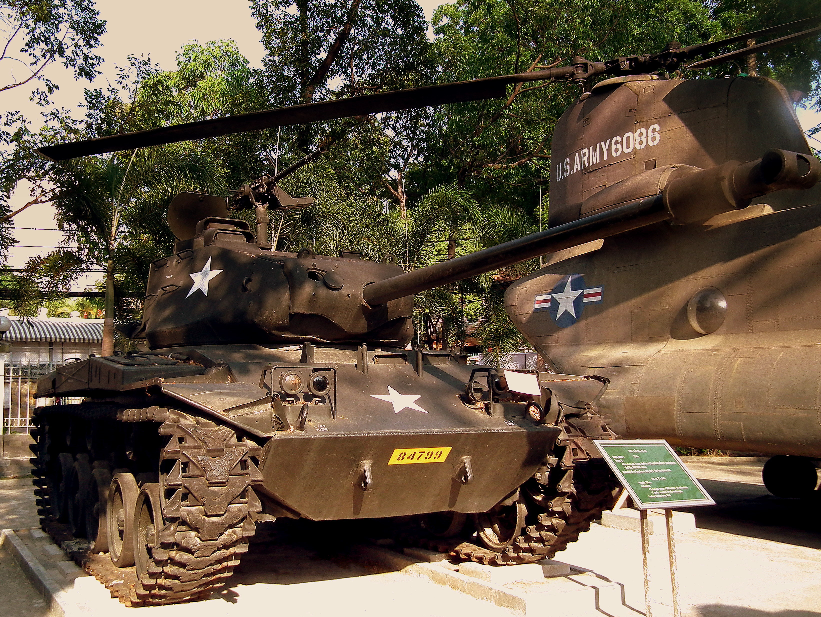 WAR REMNANTS MUSEUM SAIGON VIETNAM JAN 2012